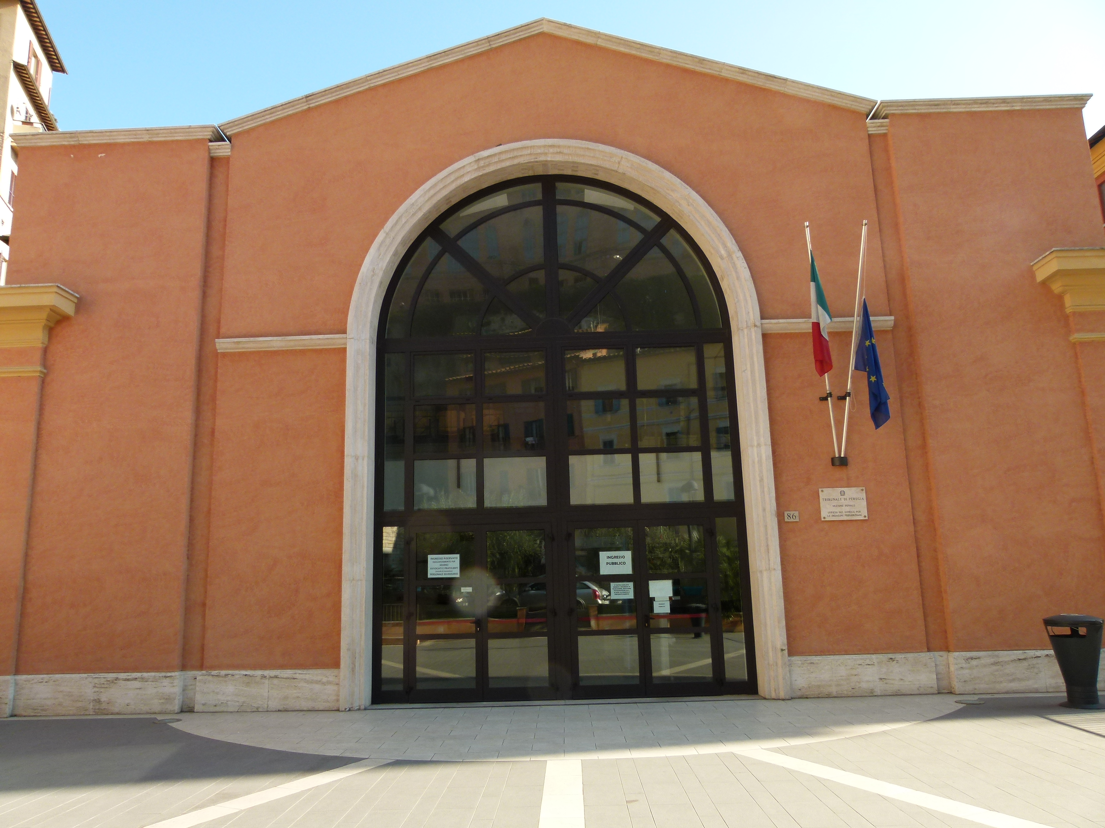 This photo was taken with Panasonic Lumix DMC-FZ100 camera, thanks to Panasonic. You can see all photographs in category: Taken with Panasonic Lumix DMC-FZ100.